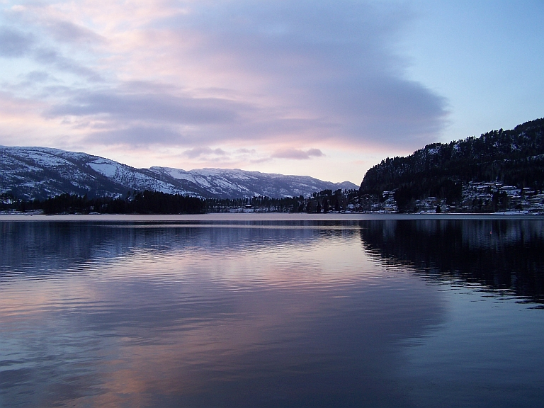 Der See Nisser am Nachmittag